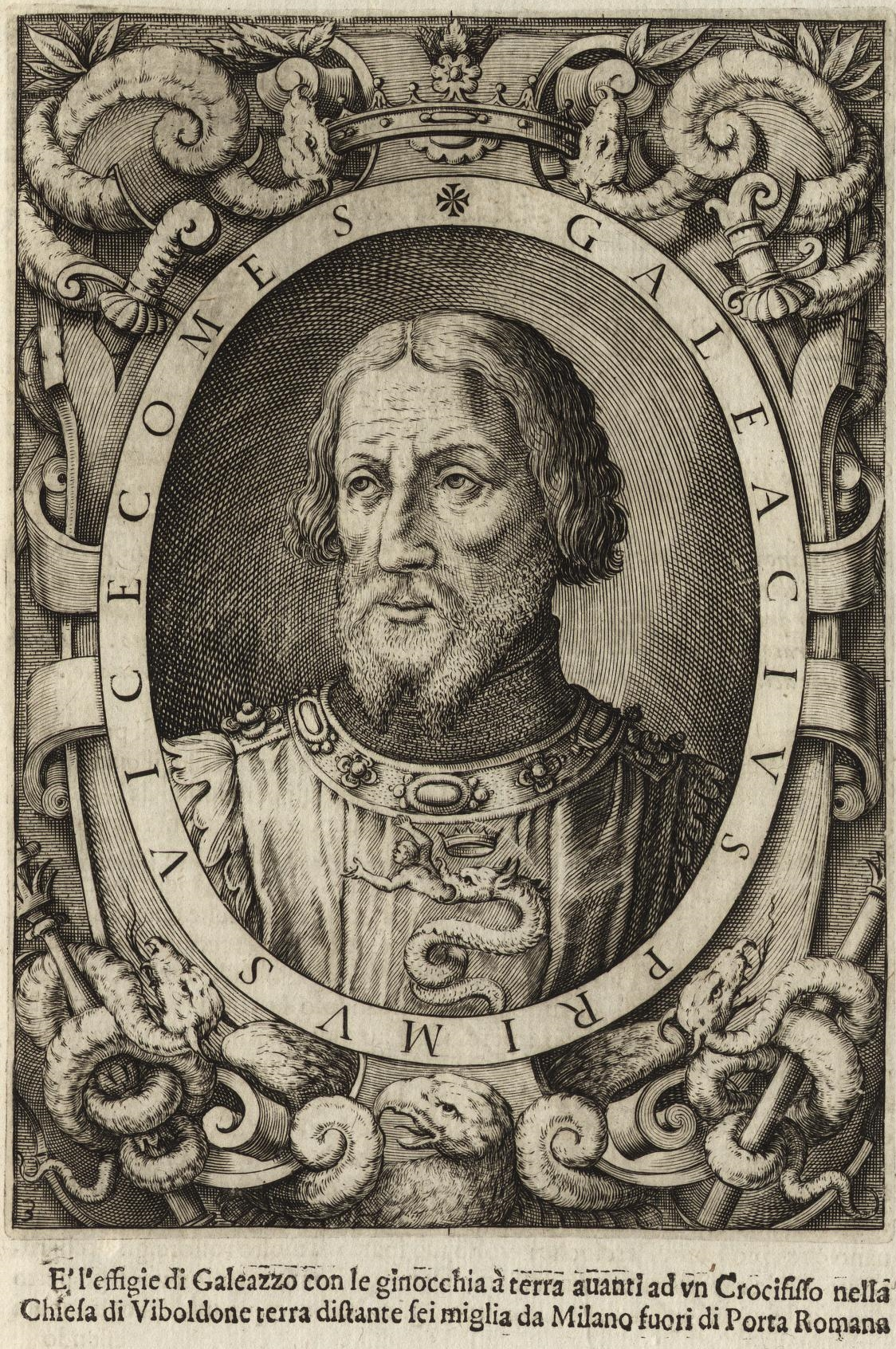 Portrait of Galeazzo I Visconti from Le vite de i dodeci Visconti che signoreggiarono Milano (1645)